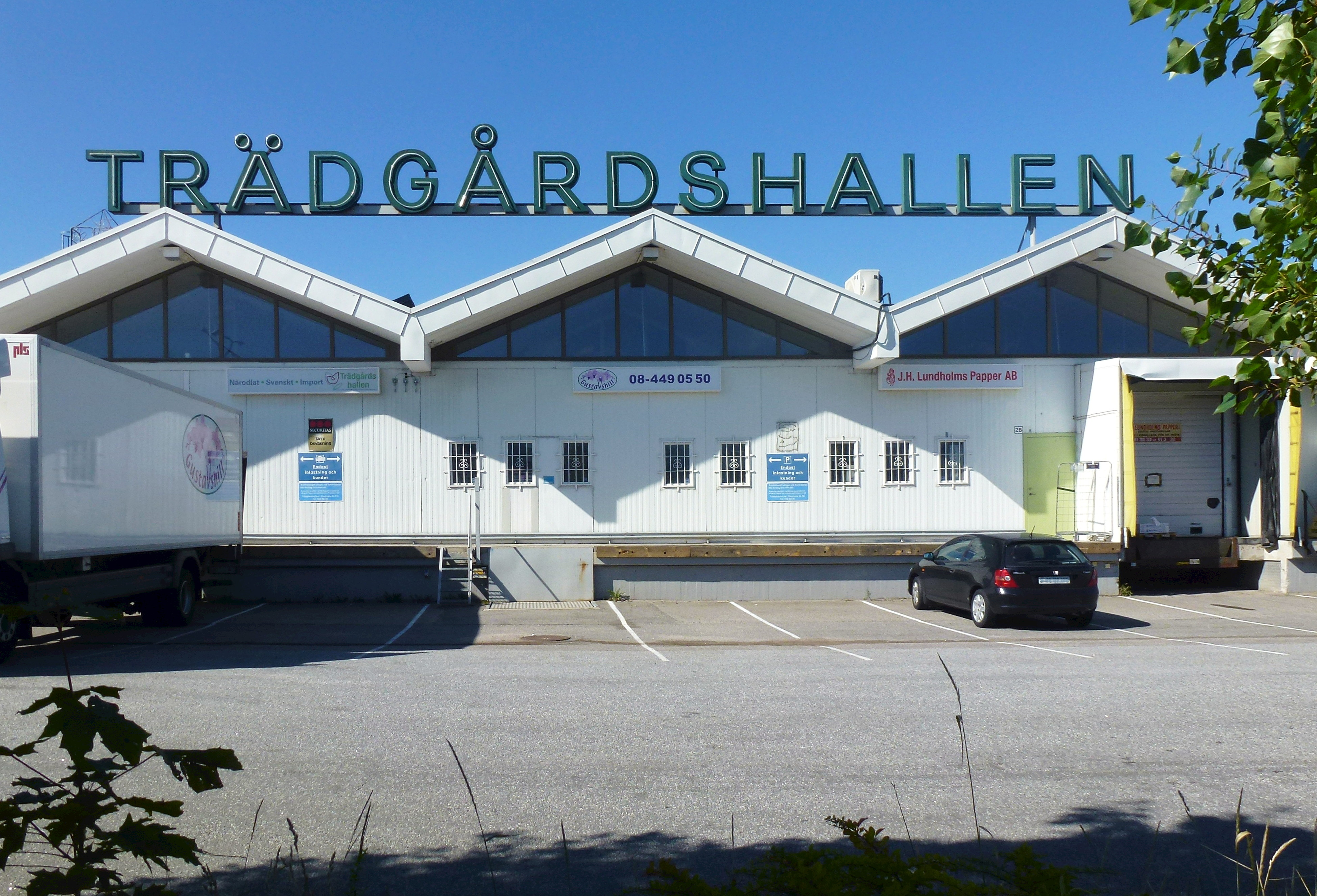 Trädgårdshallen